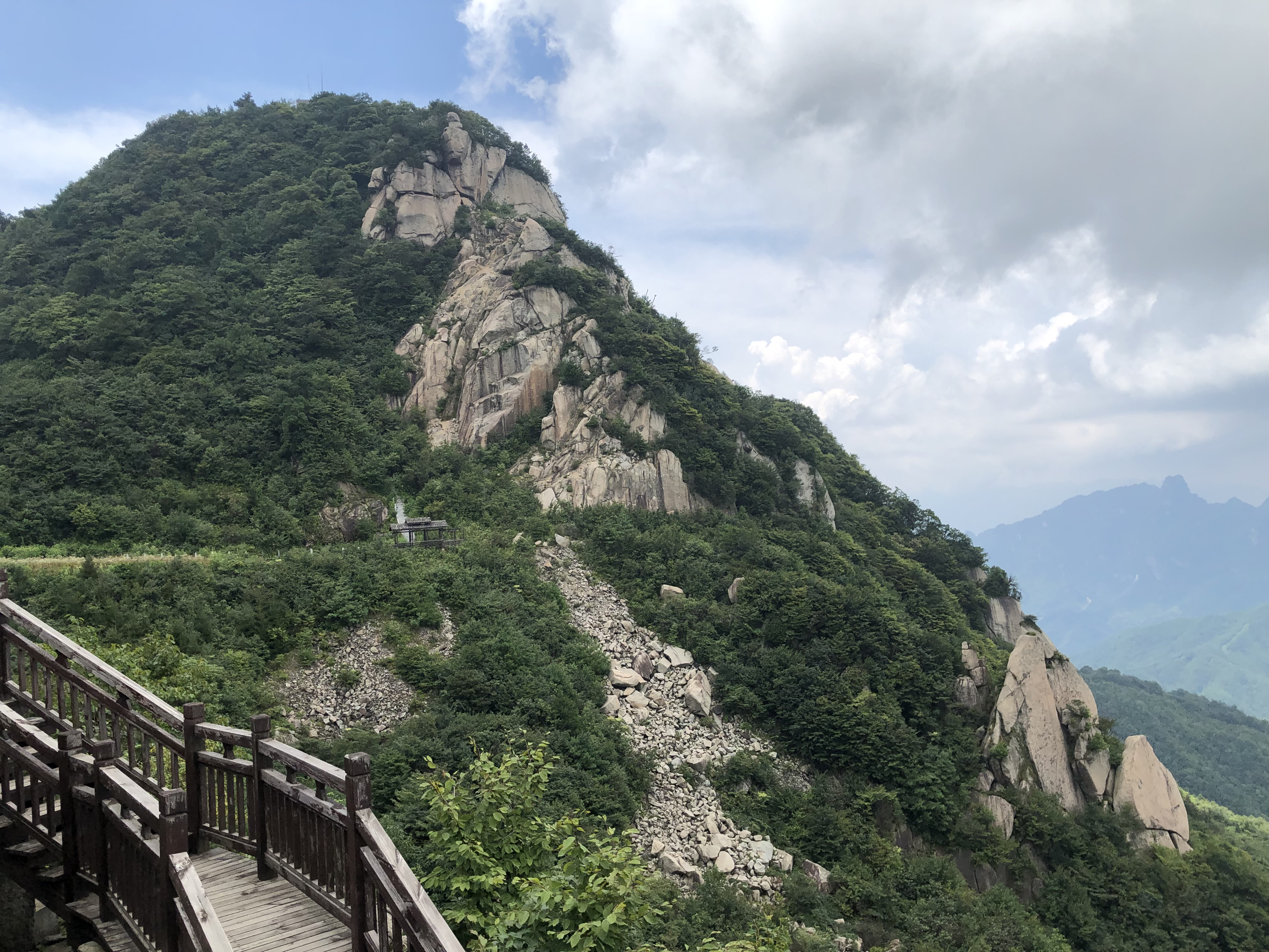 中文（中国大陆）: 大老岭天柱峰